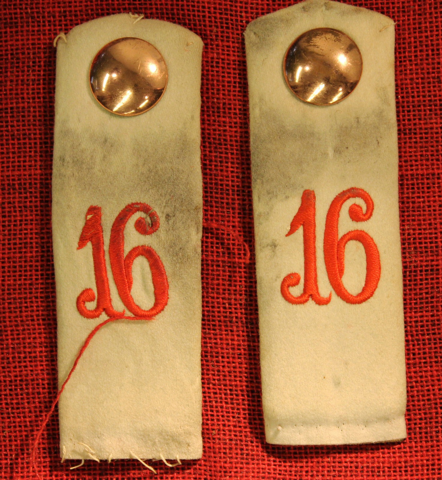 Schulterklappen: Schulterklappen (weiß-rot "16" mit kupferfarb. Knopf) und Schulterklappen "Artillerie" (gelb-gau und Emblem gekreuzte Granaten).